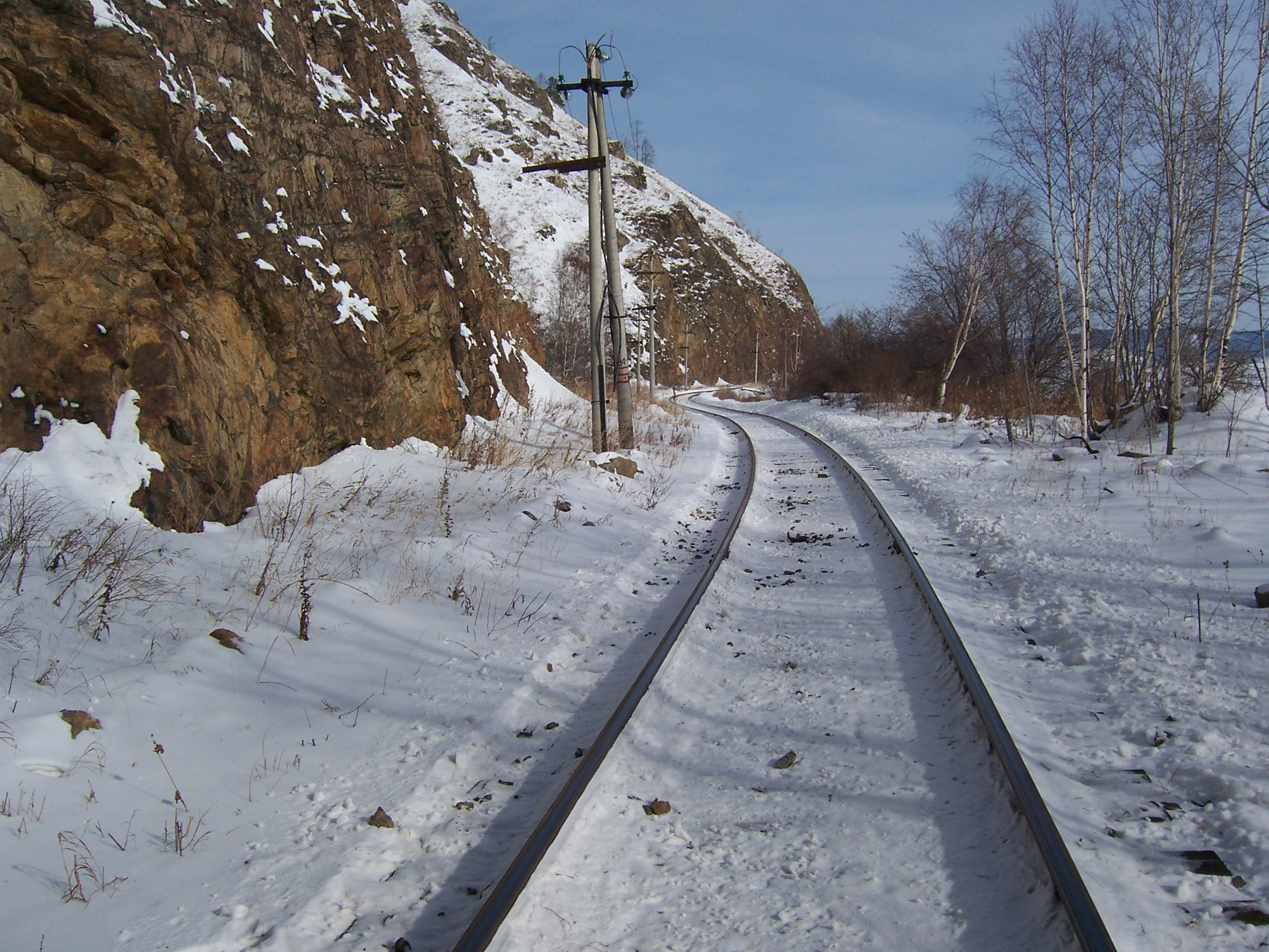 Baikal Railway near Baikal Port